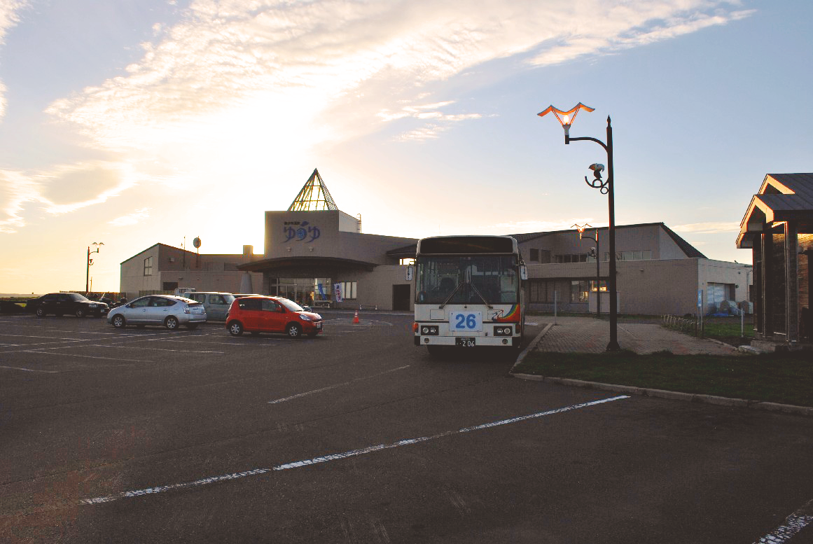 より明度調整